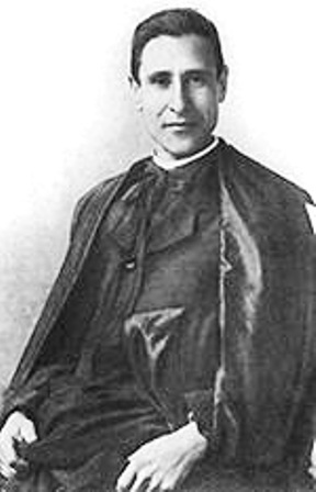 Don Rizzo, presbitero e fondatore della Banca omonima